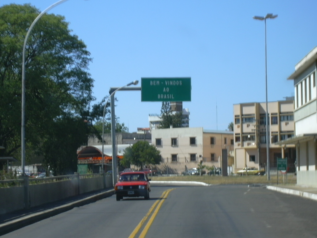 Fronteira entre o Brasil (Uruguaiana) e a Argentina (Paso de los Libres).